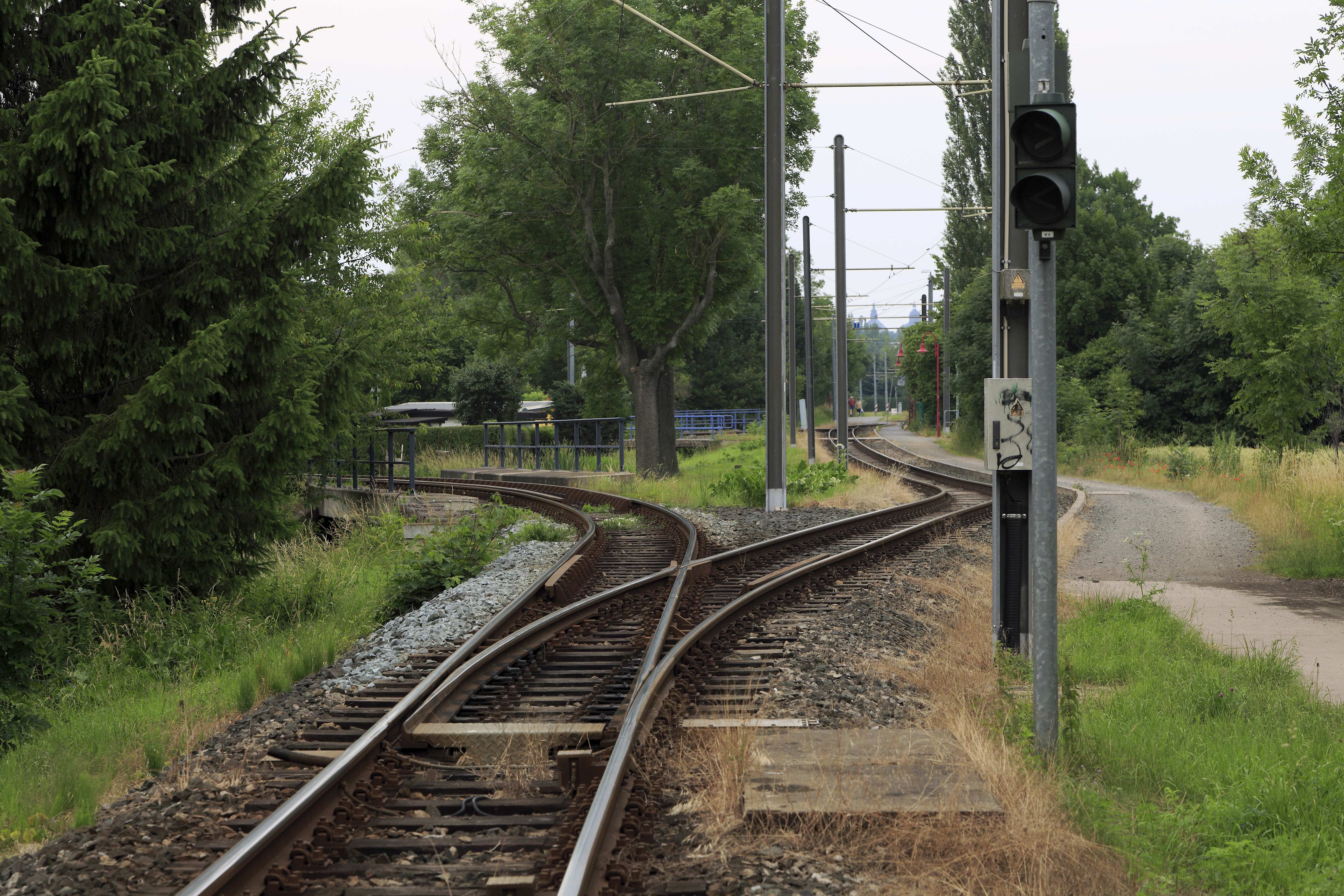 Tabarzer Spitze, die Weiche ist wie die an der Gothaer Spitze mit Holzschwellen, Oberbau Ks mit elastischer Backenschienenlagerng, Federzungen ohne Zungenplatte und einem gegossenen Blockherzstück ausgerüstet. Der Antrieb weicht jedoch deutlich ab. Das Weichensignal ist im Ruhezustand dunkel.